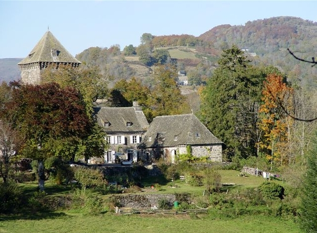 vue du château de Lescure à Saint-Martin-sous-Vigouroux, Cantal